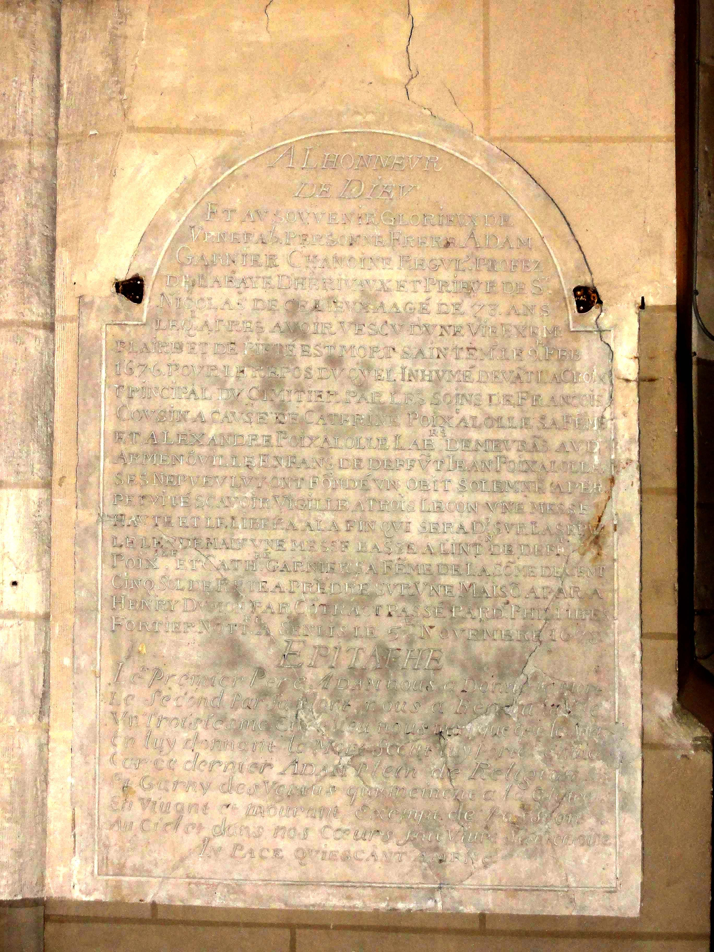 Voir titre.